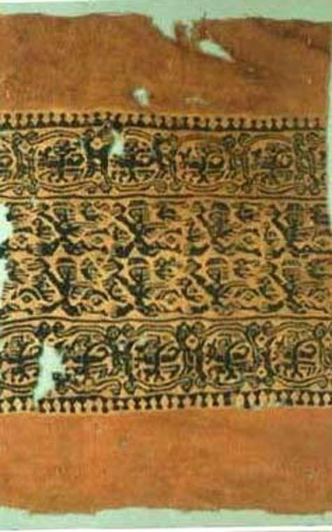 Fragmento mde un tejido copto conservado en el Museo Nacional de Cerámina y Artes Suntuarias González Martí de Valencia Spain